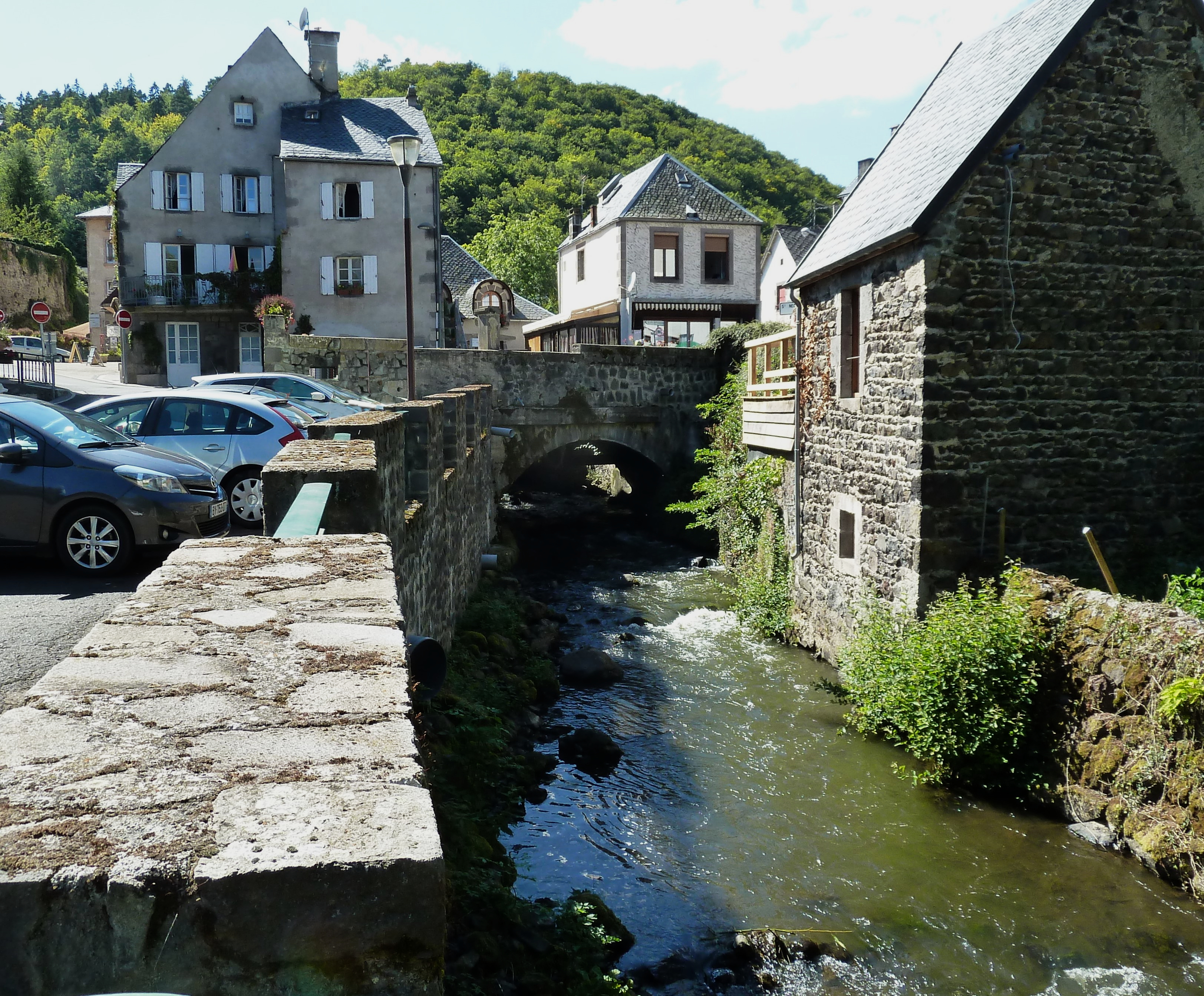 La Gouze Chambon à Murol, Puy-de-Dôme.- (Auvergne).- France. Murol